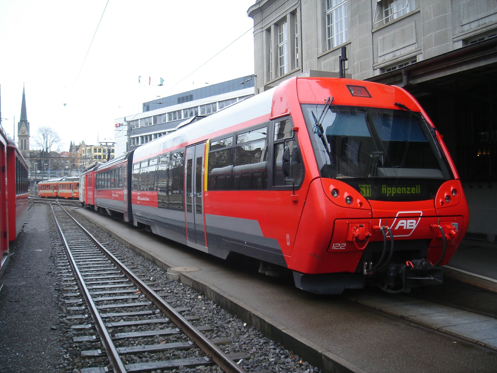 AB ABt 122 mit B 294 und BDeh 4/4 15 in St. Gallen (Nebenbahnhof)